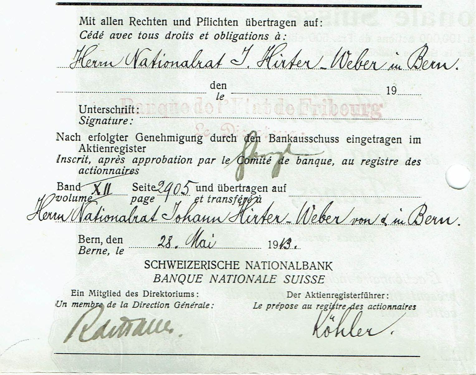 Ausschnitt der Rückseite einer Namensaktie der Schweizer Nationalbank von 1907 mit Übertragungsvermerk